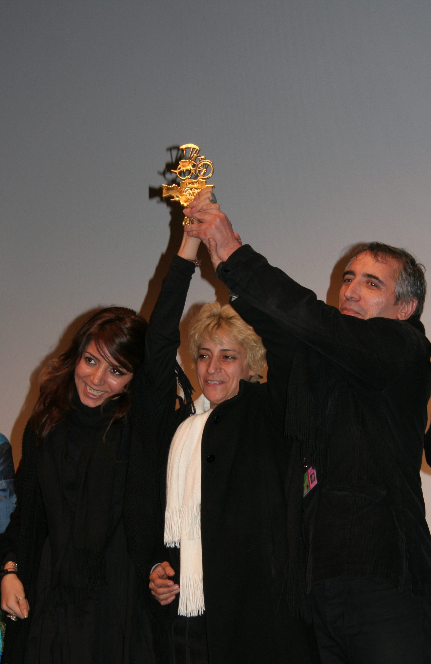 Hana Makhmalbaf, Marziyeh Meshkini, Mohsen Makhmalbaf, cyclo d'or au festival international des cinémas d'Asie de Vesoul en 2009.